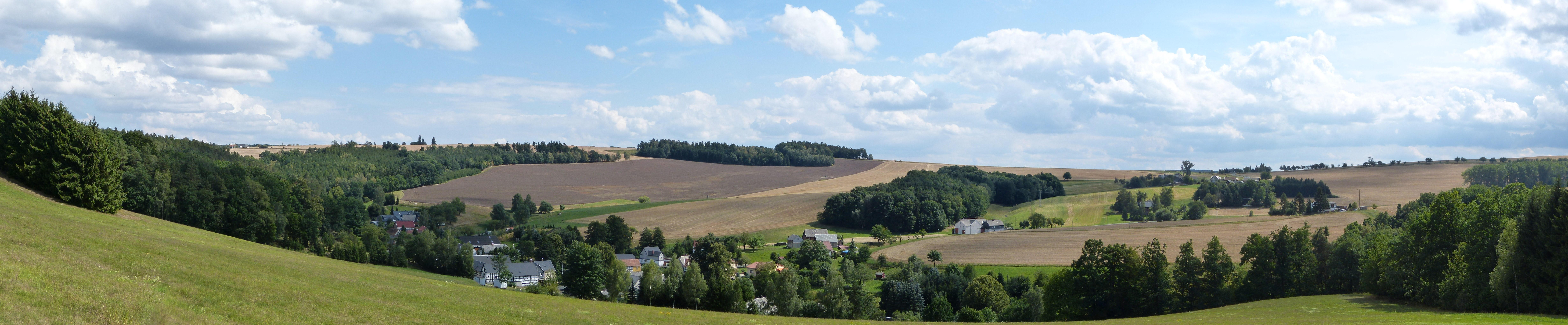 Landschaft um Obergeißendorf. Blick nach Süden